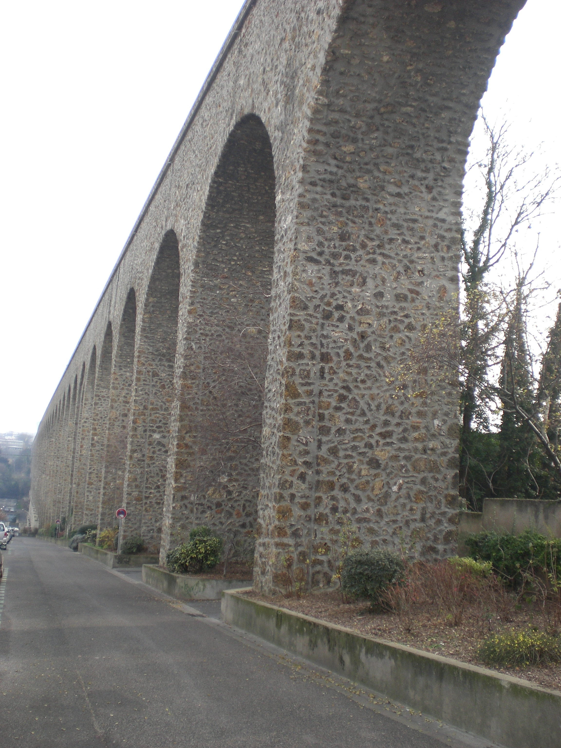 Arcueil, France Aqueduc Bellegrand,côté Ouest, vue depuis Arcueil